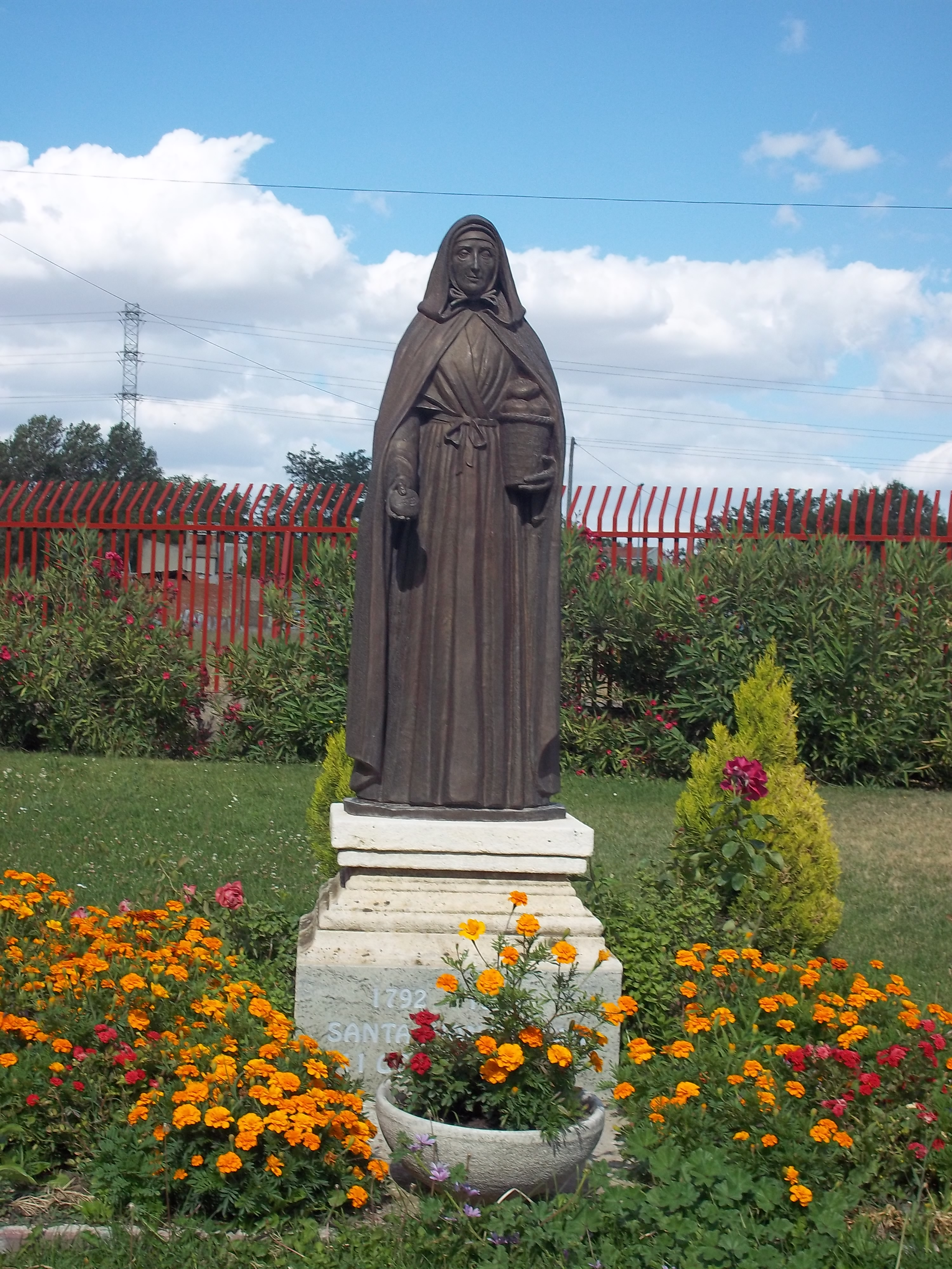 Estatua de Juana Jugan en la casa de las Hermanitas de los Pobres en Valladolid (España).